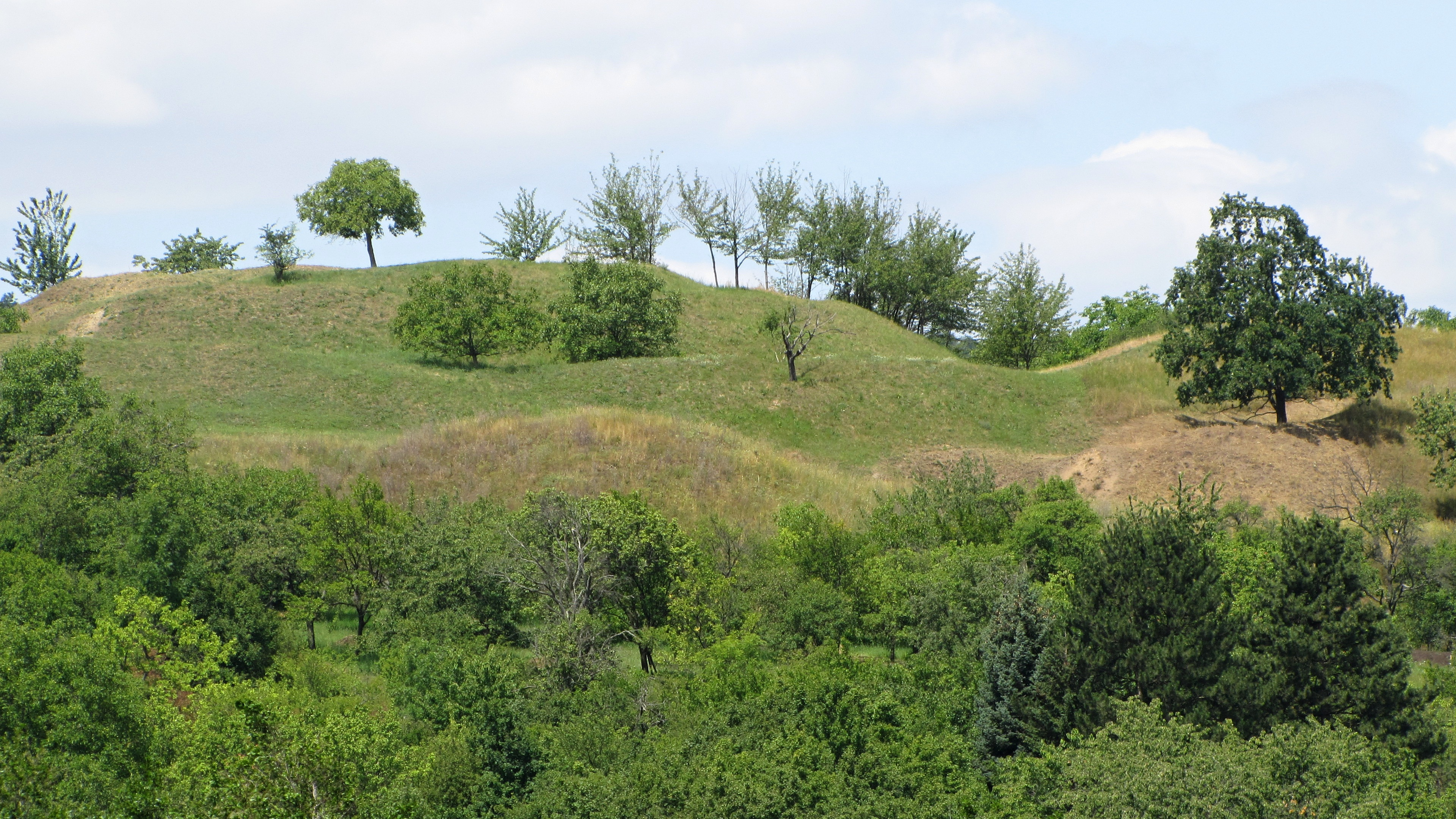 Přírodní památka Bohuslavické stráně